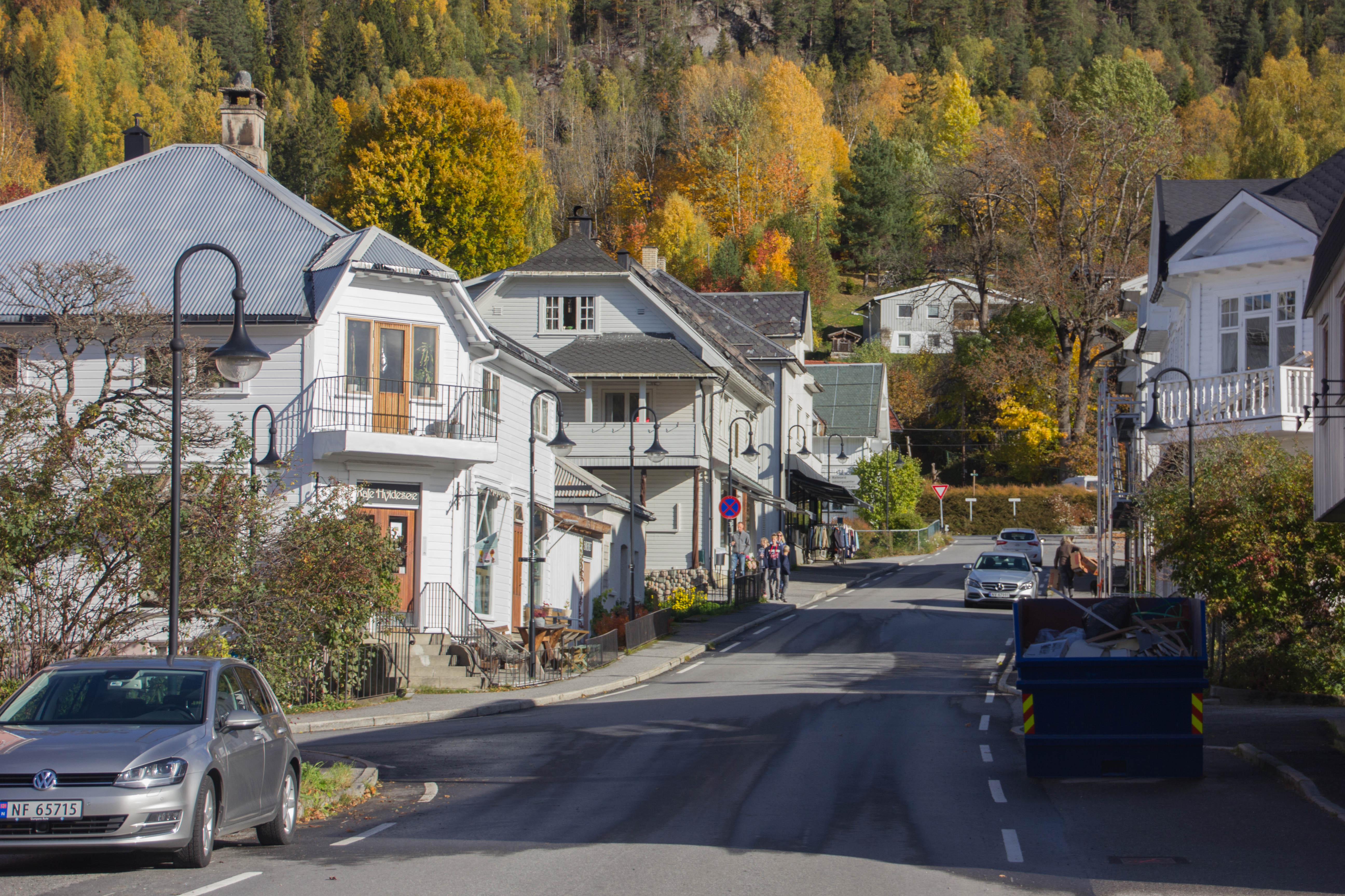 Kviteseidgata igjennom sentrum. (Foto: Aksel S.Lister)